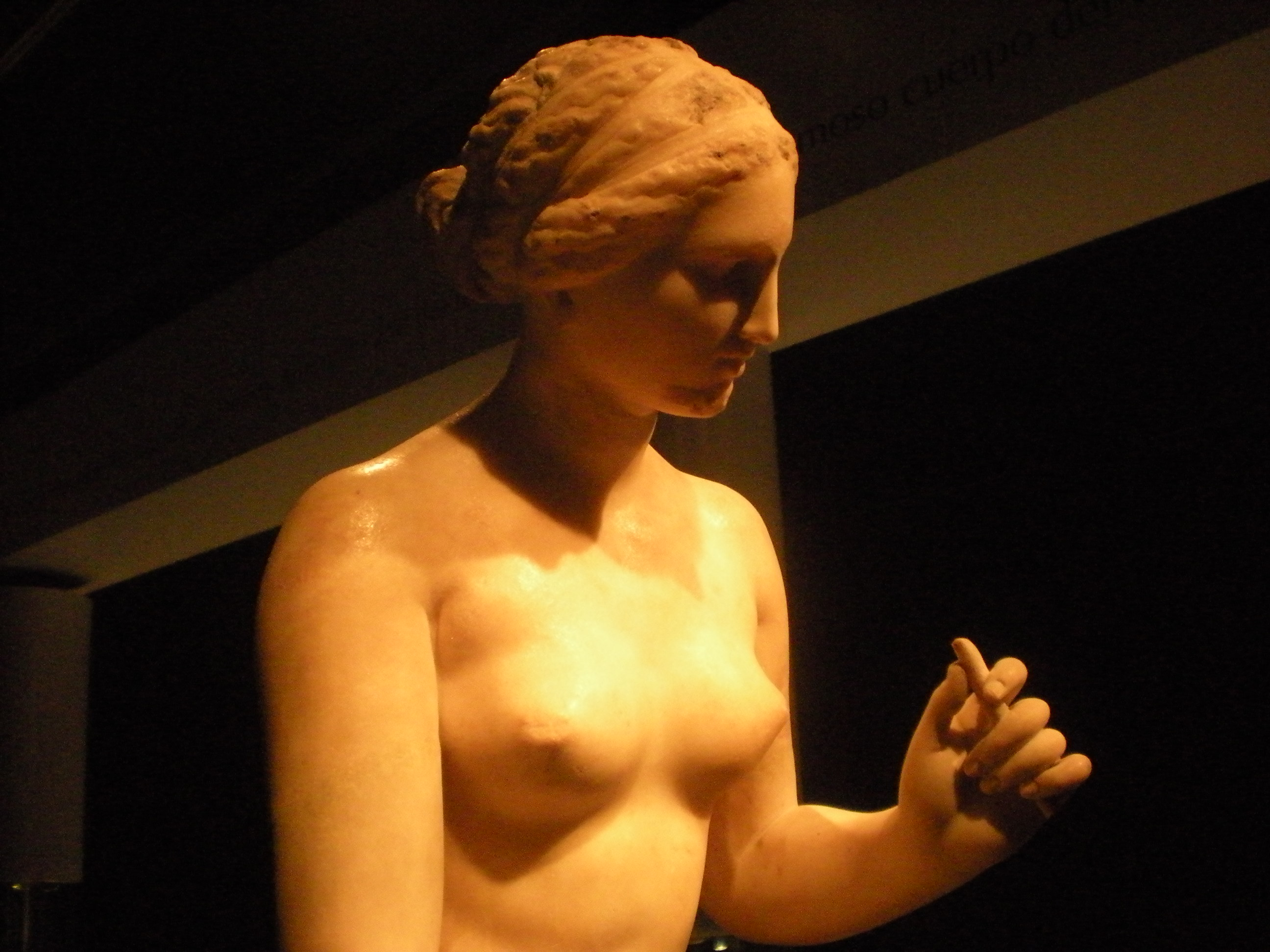 Estatua de Afrodita en mármol de Paros. La obra de Praxíteles sirvió de inspiración para numerosas copias y variantes. En esta versión a tamaño reducido, los brazos fueron restaurados por el escultor inglés Joseph Nollekens a finales del siglo XVIII. Un leve resalte en la barbilla apunta a que, en el original, la diosa alzaba la mano tocándose el rostro con los dedos. Época romana, versión de un original griego del siglo IV a. C., procedente de Ostia, Italia. Dimensiones: 1070 mm x 330 mm x 350 mm. GR 1805,0703.16 (escultura 1577). Pertenece a la exposición La belleza del cuerpo, en el MARQ. Forma parte de la exposición permanente del Museo Británico.